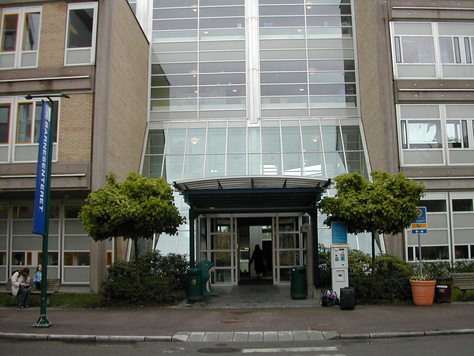 Hovedinngangen.